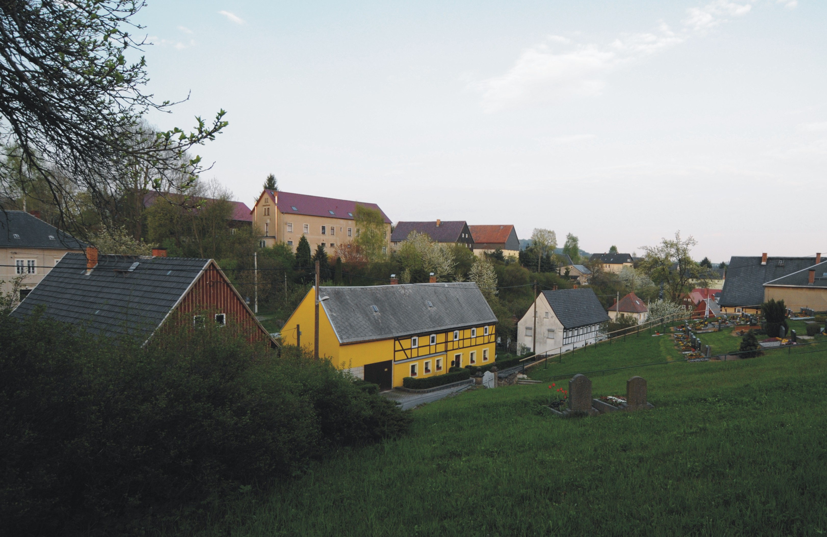 Blick auf den Dorfkern von Ulbersdorf bei Hohnstein (Landkreis Sächsische Schweiz-Osterzgebirge, Sachsen, Deutschland)